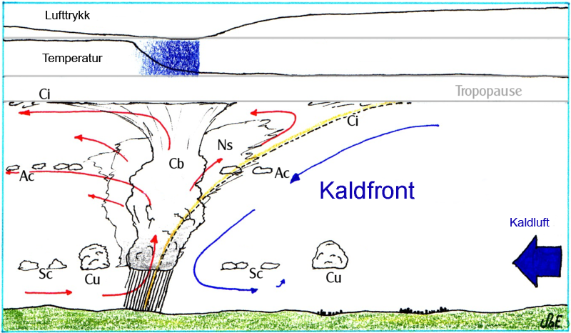 Kaldfront Kjelde: Wikimedia Commons. Laga av Benutzer:LivingShadow og oversatt til norsk.